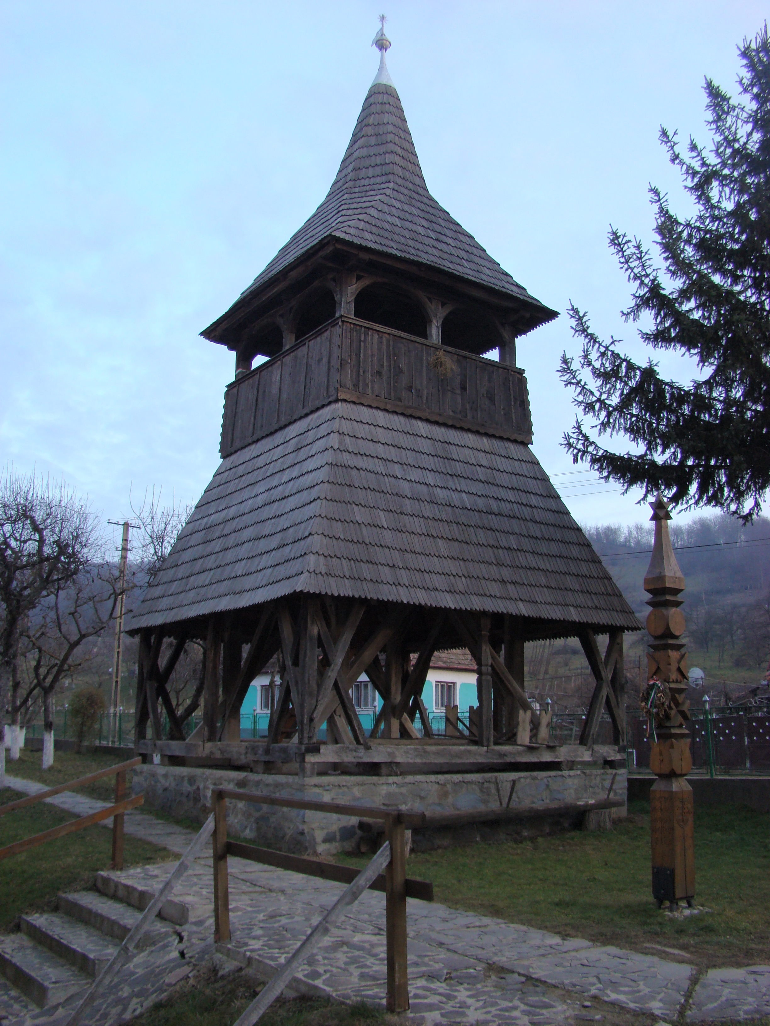 Clopotnița din lemn a bisericii reformate din Gogan-Varolea, sat Gogan; comuna Bahnea, județul Mureș 02